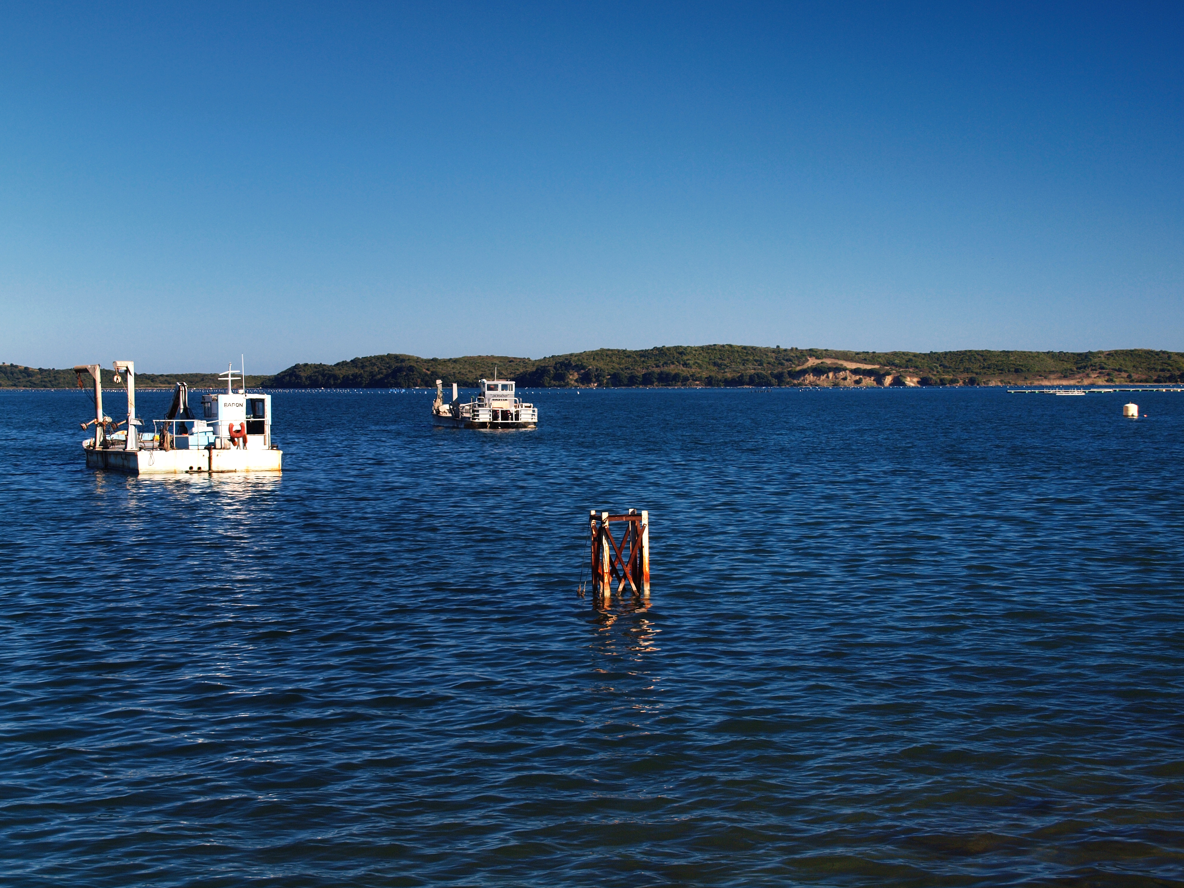 Aléria (Corsica) - Étang de Diana